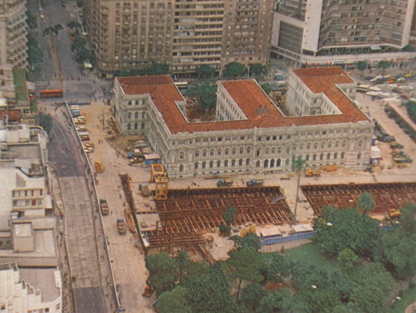 Vista das obras da estação República. Apesar da grande intervenção realizada, o projeto implantado preservou o Colégio Caetano de Campos.